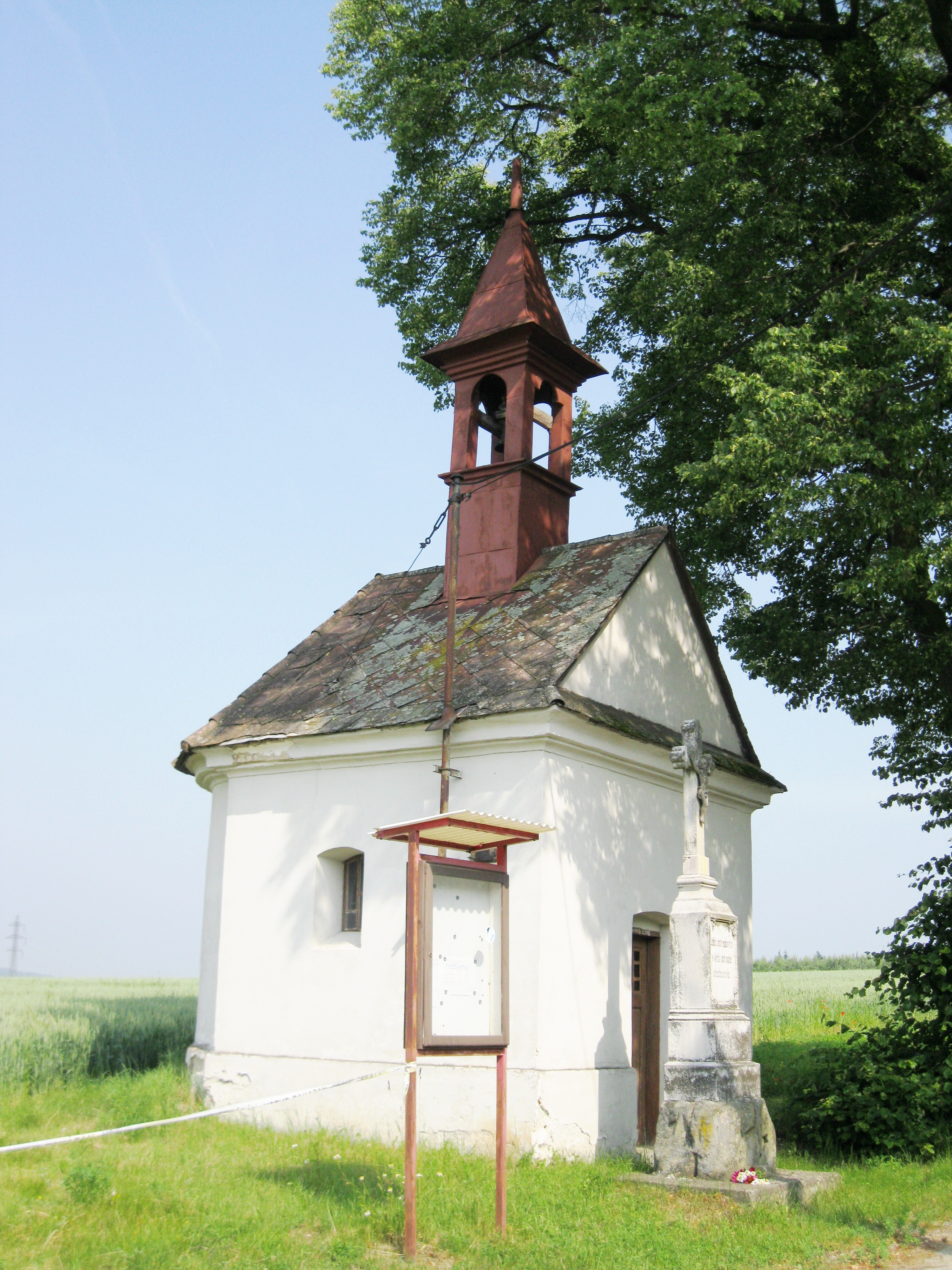 Kaplička se zvonicí (Zavadilka), v poli u silnice, Zavadilka